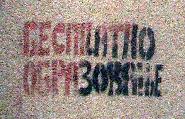 Grafit besplatno obrazovanje (free education).